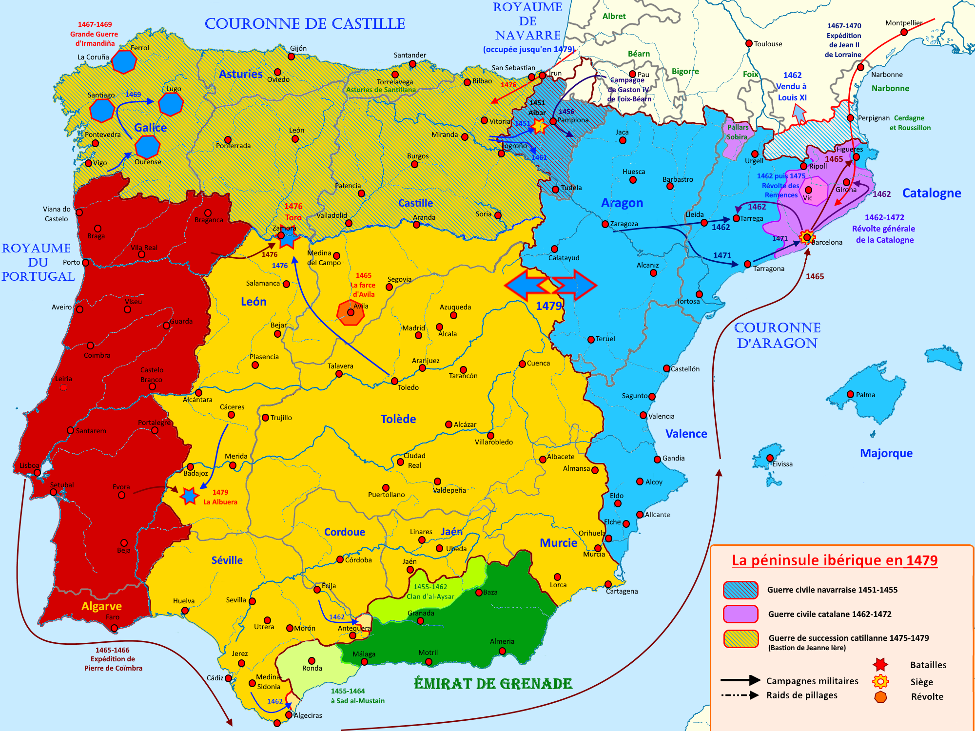 Carte de la péninsule ibérique en 1479 illustrant les principaux évènements de l'époque